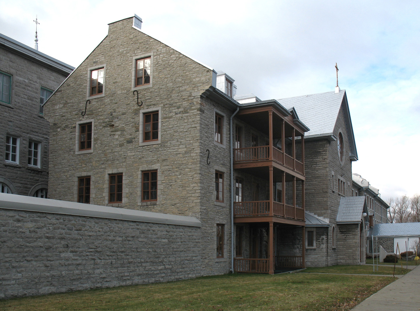 Hôpital général de Québec à Notre-Dame-des-Anges. Municipalité de paroisse enclavée dans le territoire de la ville de Québec. Région de la Capitale-Nationale, province de Québec (Canada). Elle renferme le monastère des Augustines de Québec et l'Hôpital général de Québec. Adresse : 260, boulevard Langelier, Québec